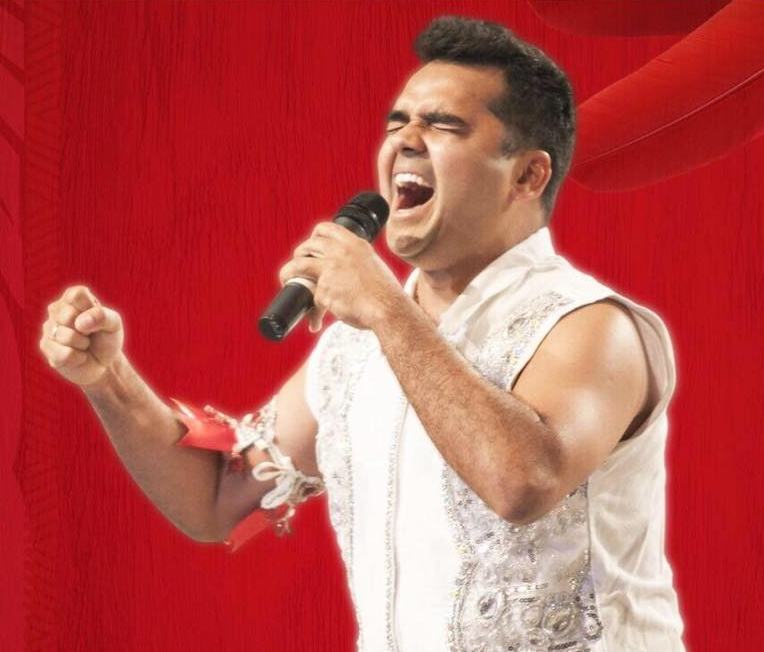 Israel Paulain, Apresentador do Garantido desde 2002.